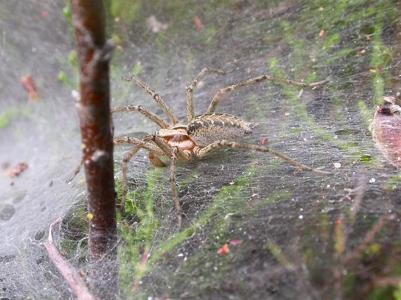 Agelena labyrinthica, Bordeaux, France